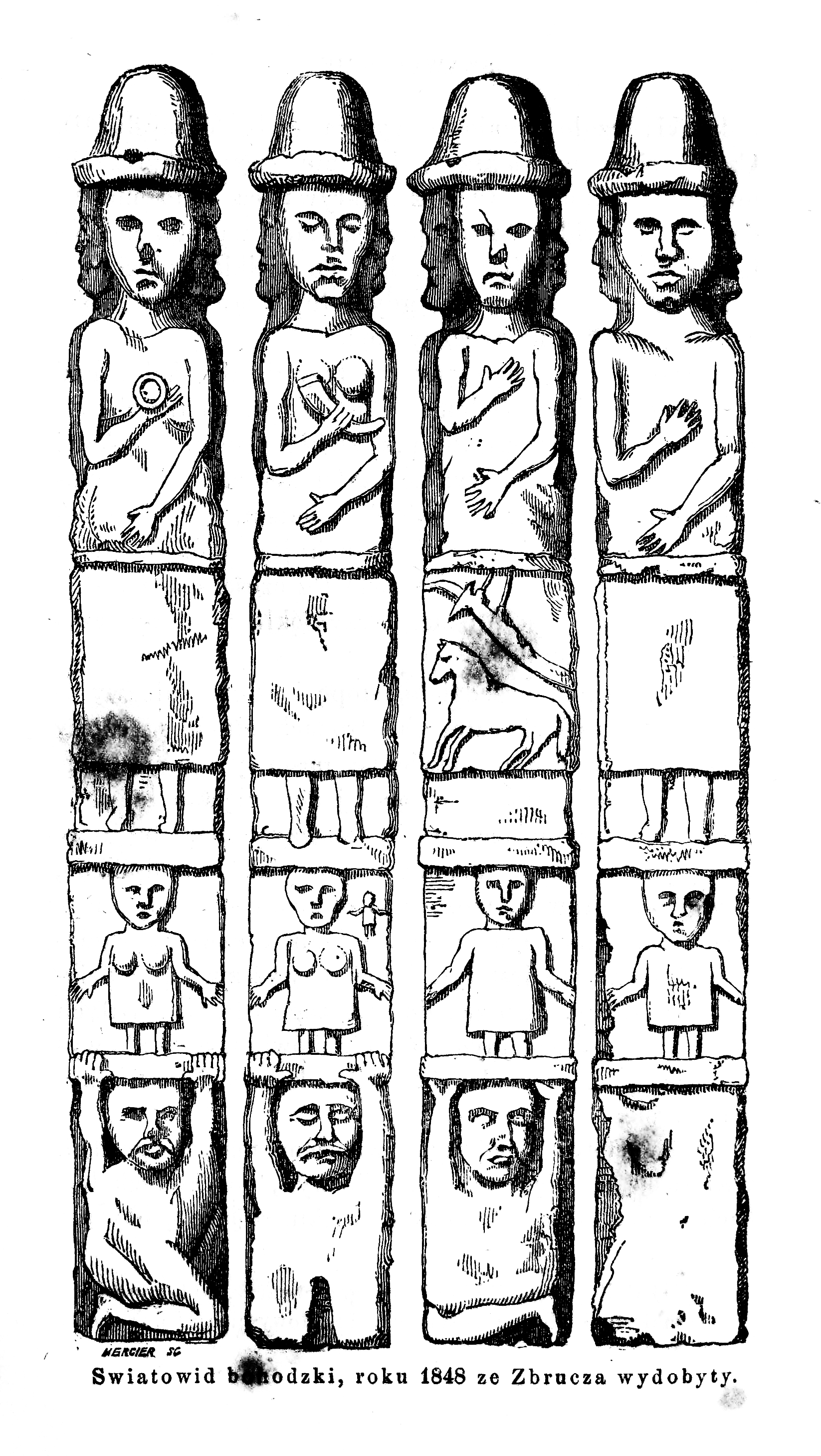 Światowid ze Zbrucza: rysunek z książki "Narody na ziemiach słowiańskich przed powstaniem Polski" Joachima Lelewela.